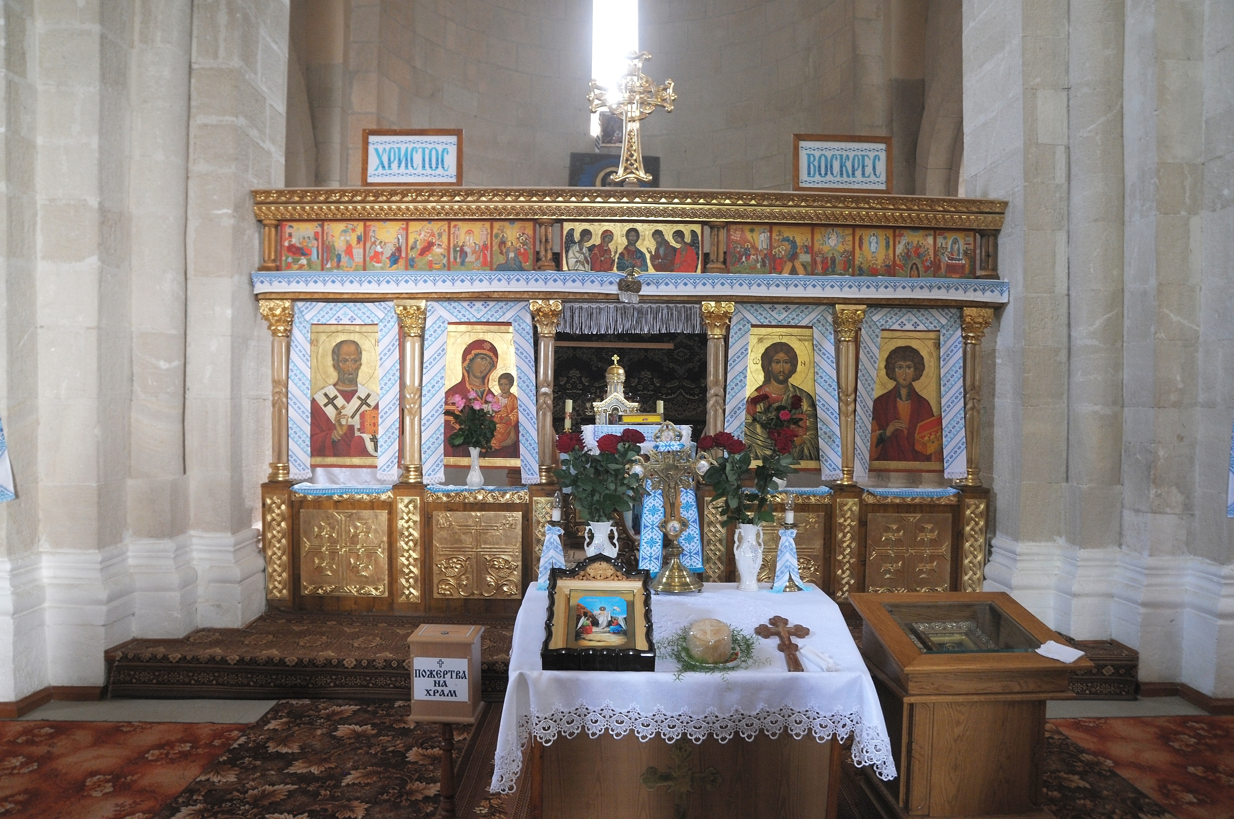 Церква Святого Пантелеймона, Шевченкове, ур. Свята Гора